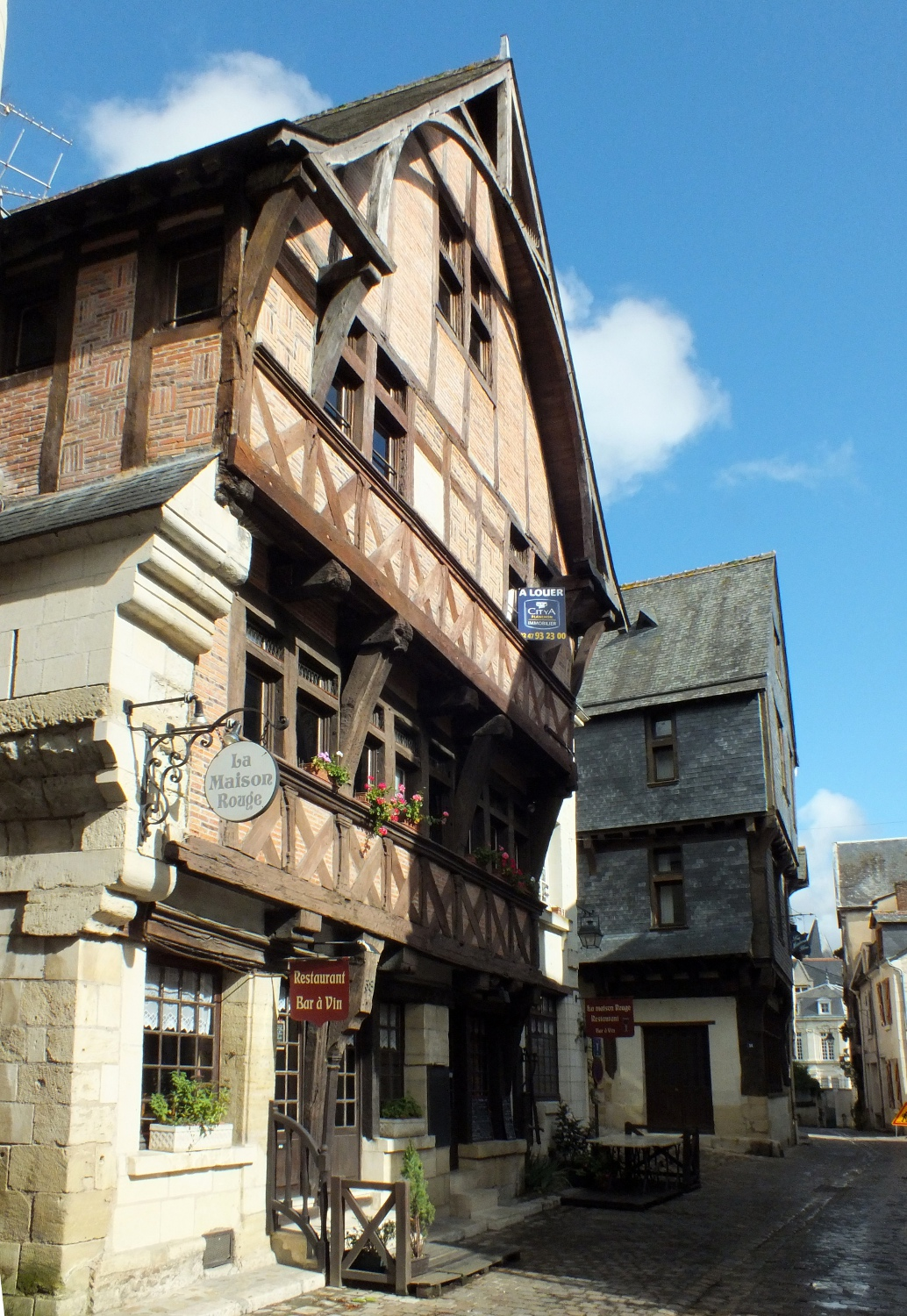 Le grand carroi, principal carrefour de la Ville-fort à l'époque médiévale.